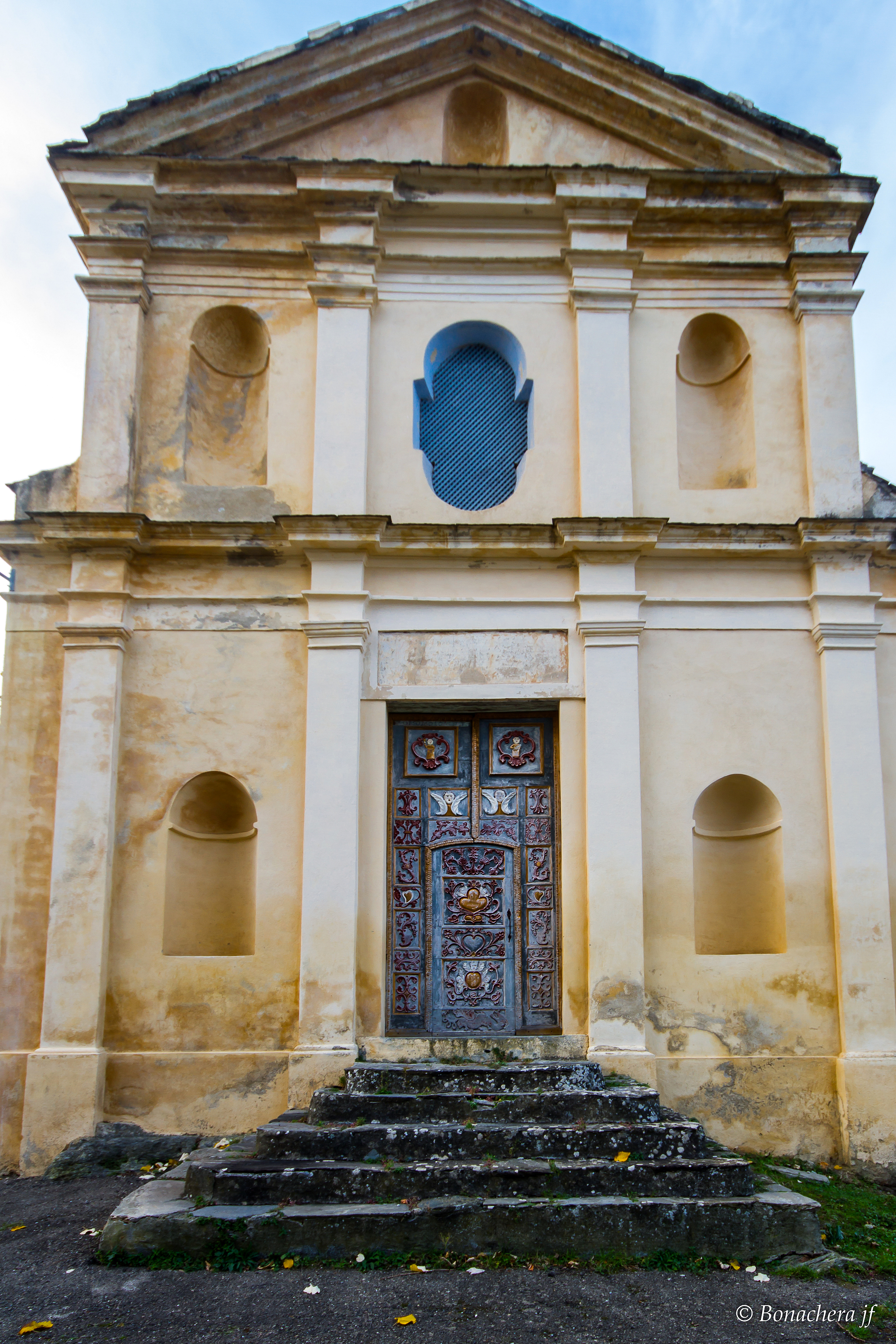 L'église de Piedipartinu et sa magnifique porte recemment restaurée